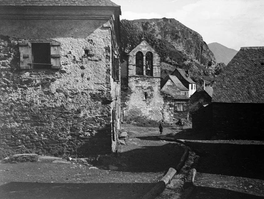 Imatge